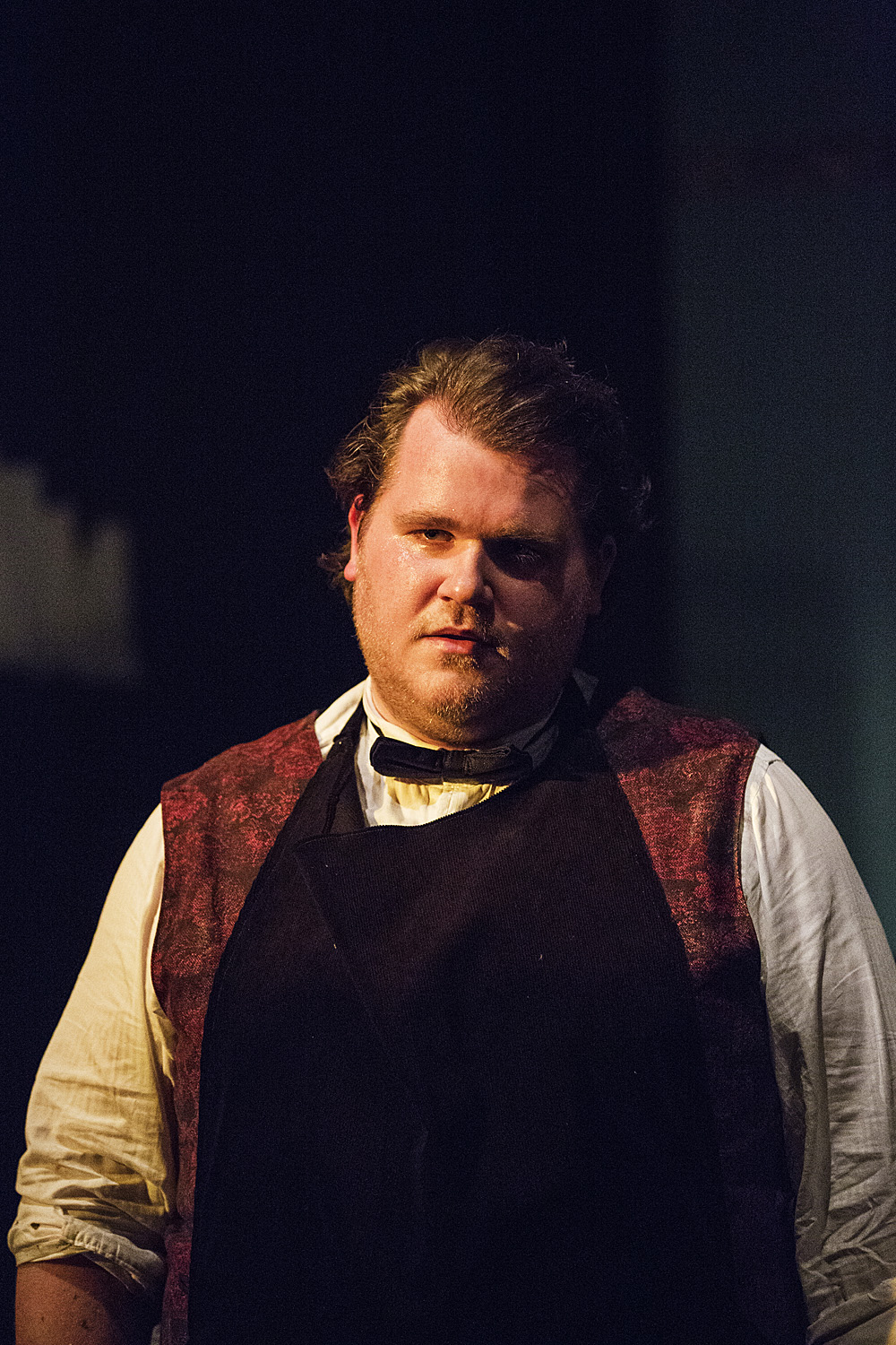 Björn Meyer bei einer KARLMAYSELF Vorstellung in Hamburg.